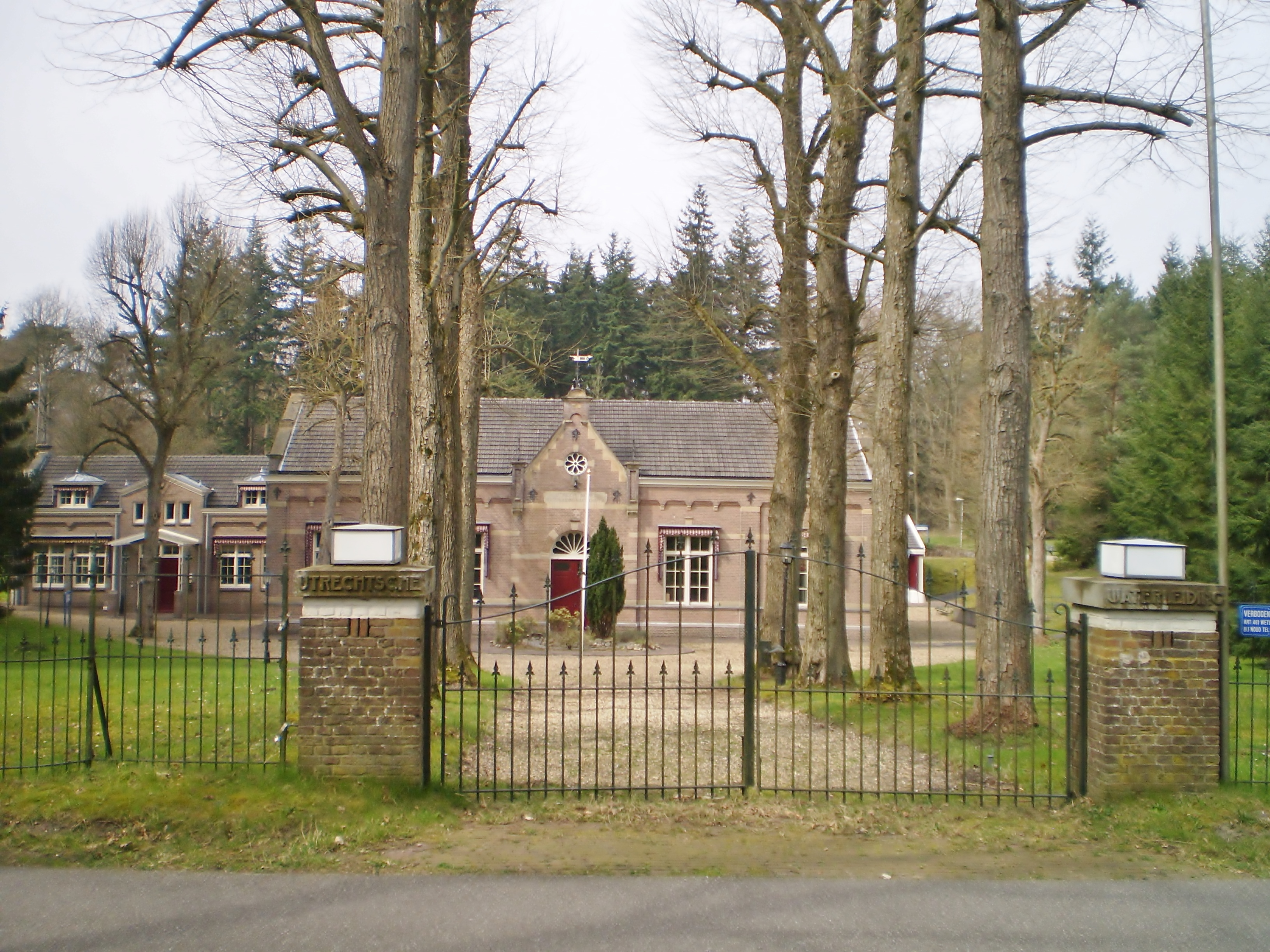 Soestduinen waterpompstation